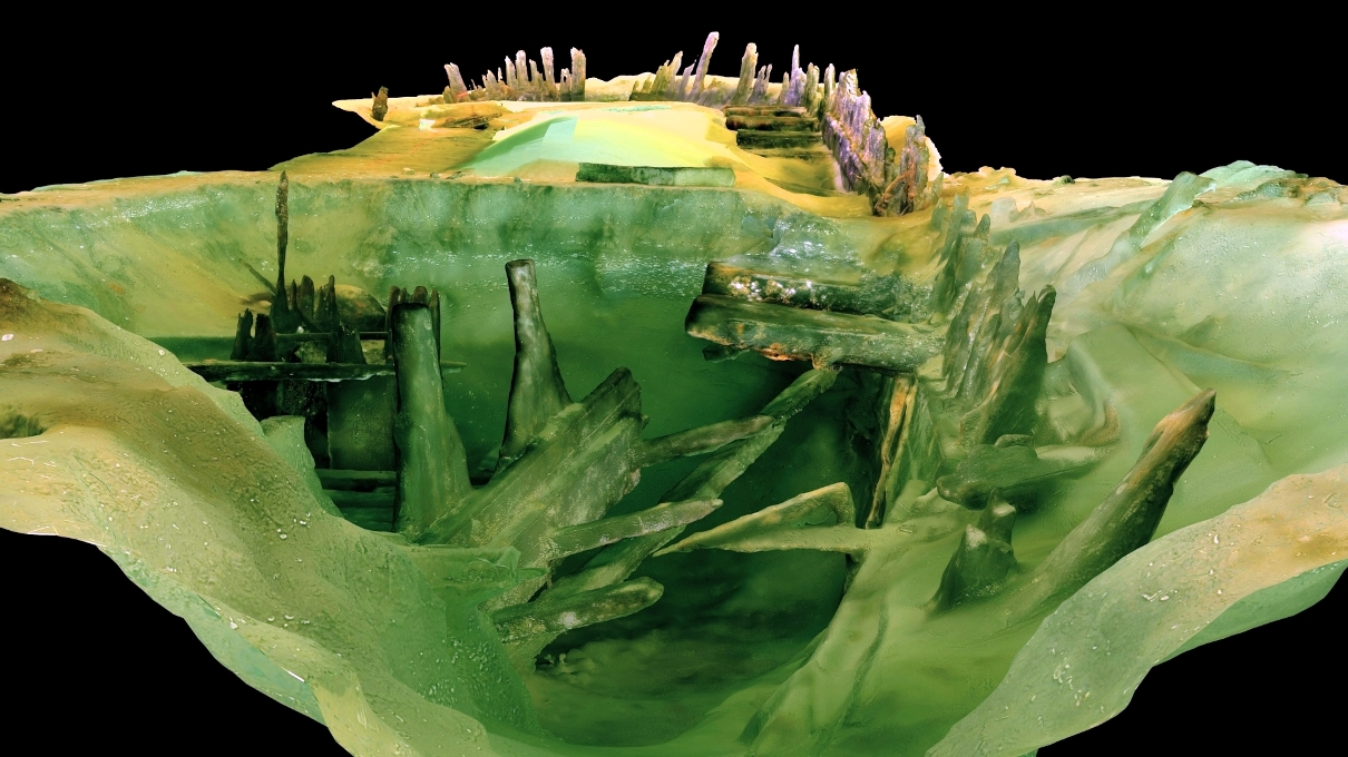 Wrak 'Portowiec'. Obraz przygotowany w ramach prac nad Wirtualnym Skansenem Wraków Zatoki Gdańskiej. Narodowe Muzeum Morskie w Gdańsku